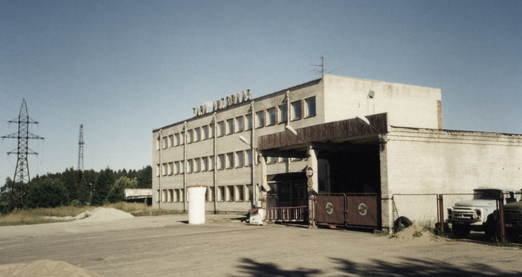 Автобаза города Тапа, 1997 г.